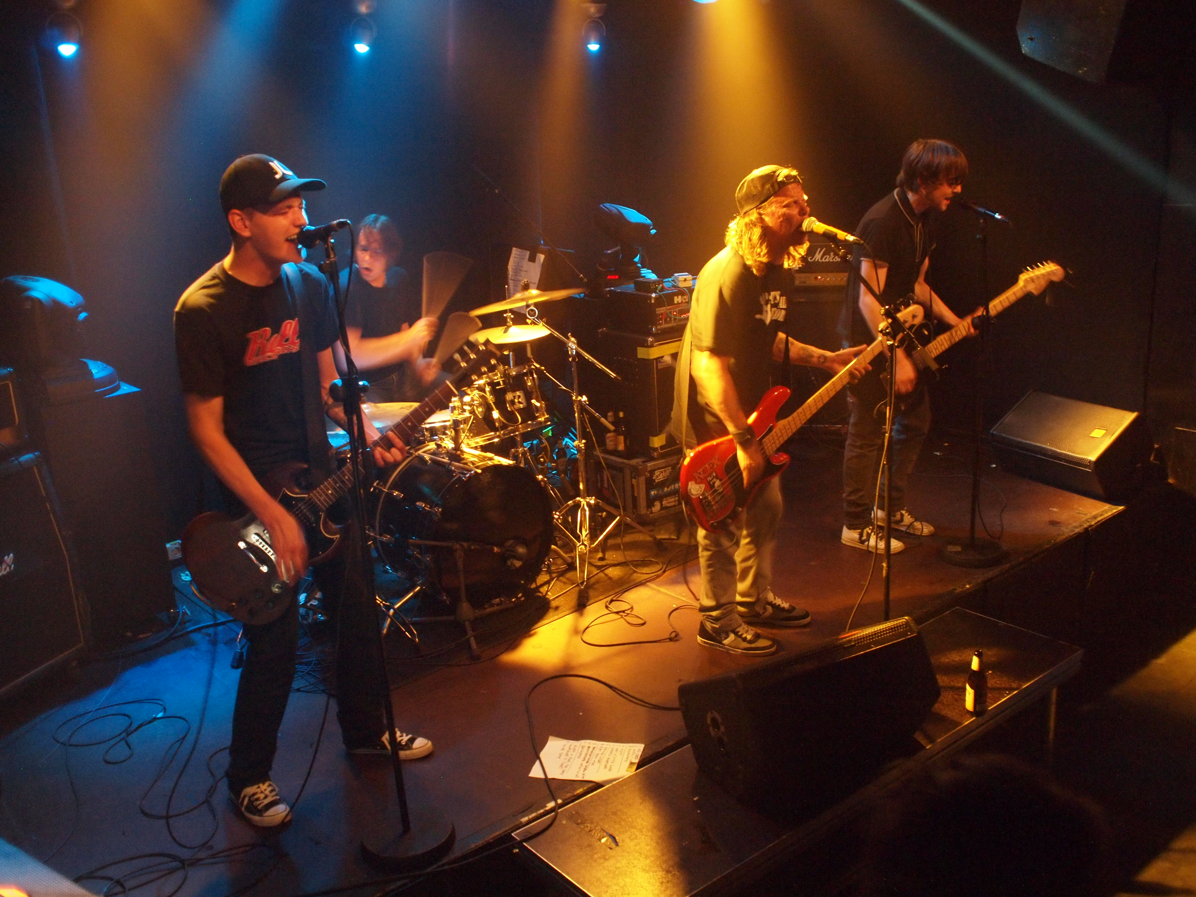 The Apers in het ACU te Utrecht, Netherlands.